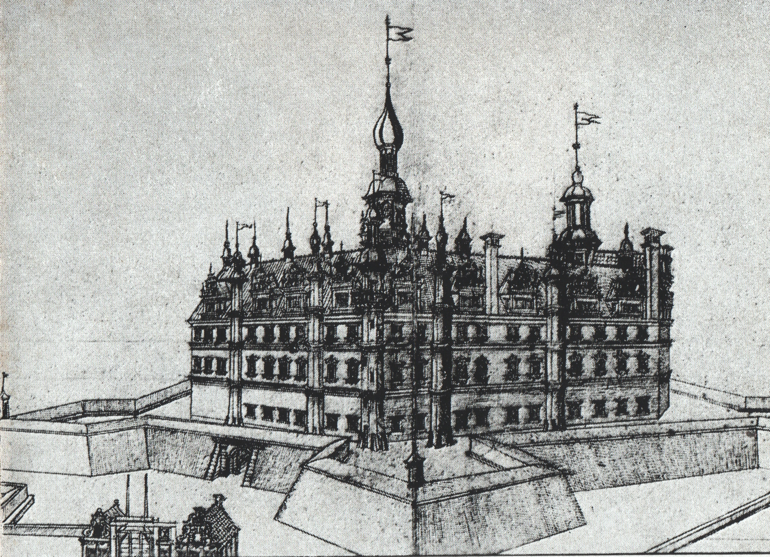 Perspektivische Ansicht des Schweriner Schlosses mit Bastionen von Nordwesten. Tuschezeichnung, (Ausschnitt).